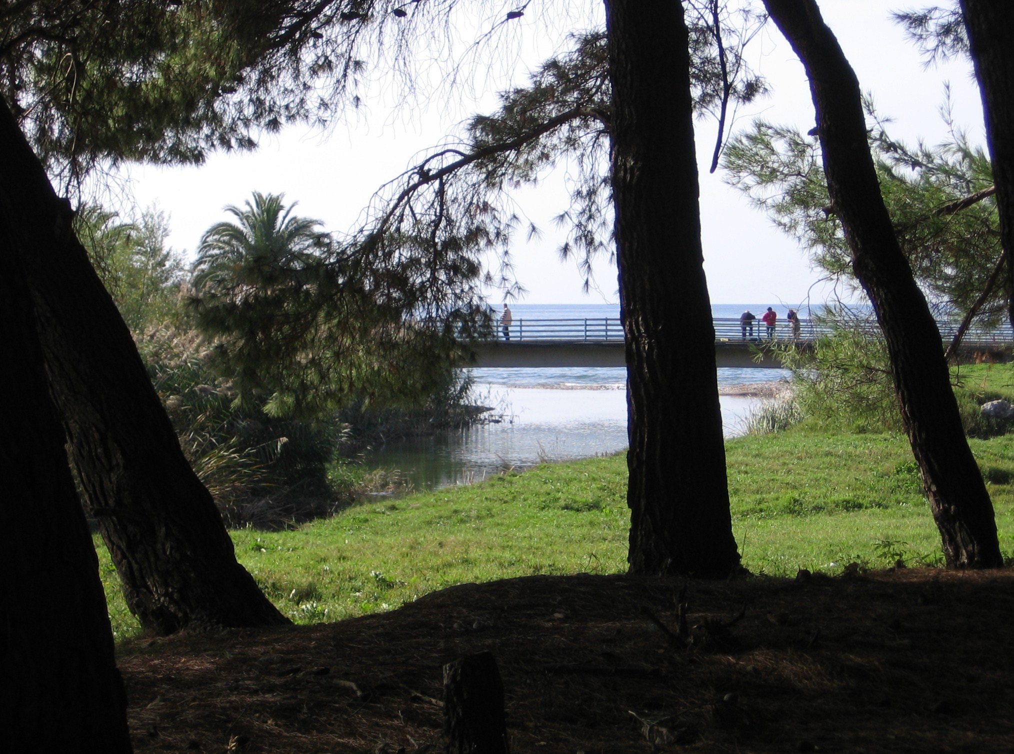 Bar, reka Željeznica - Железница